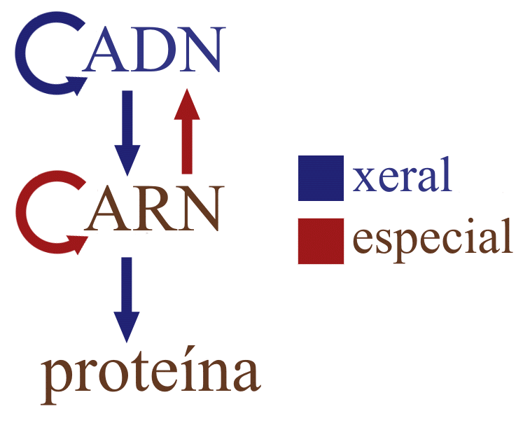 fluxo de información xenética